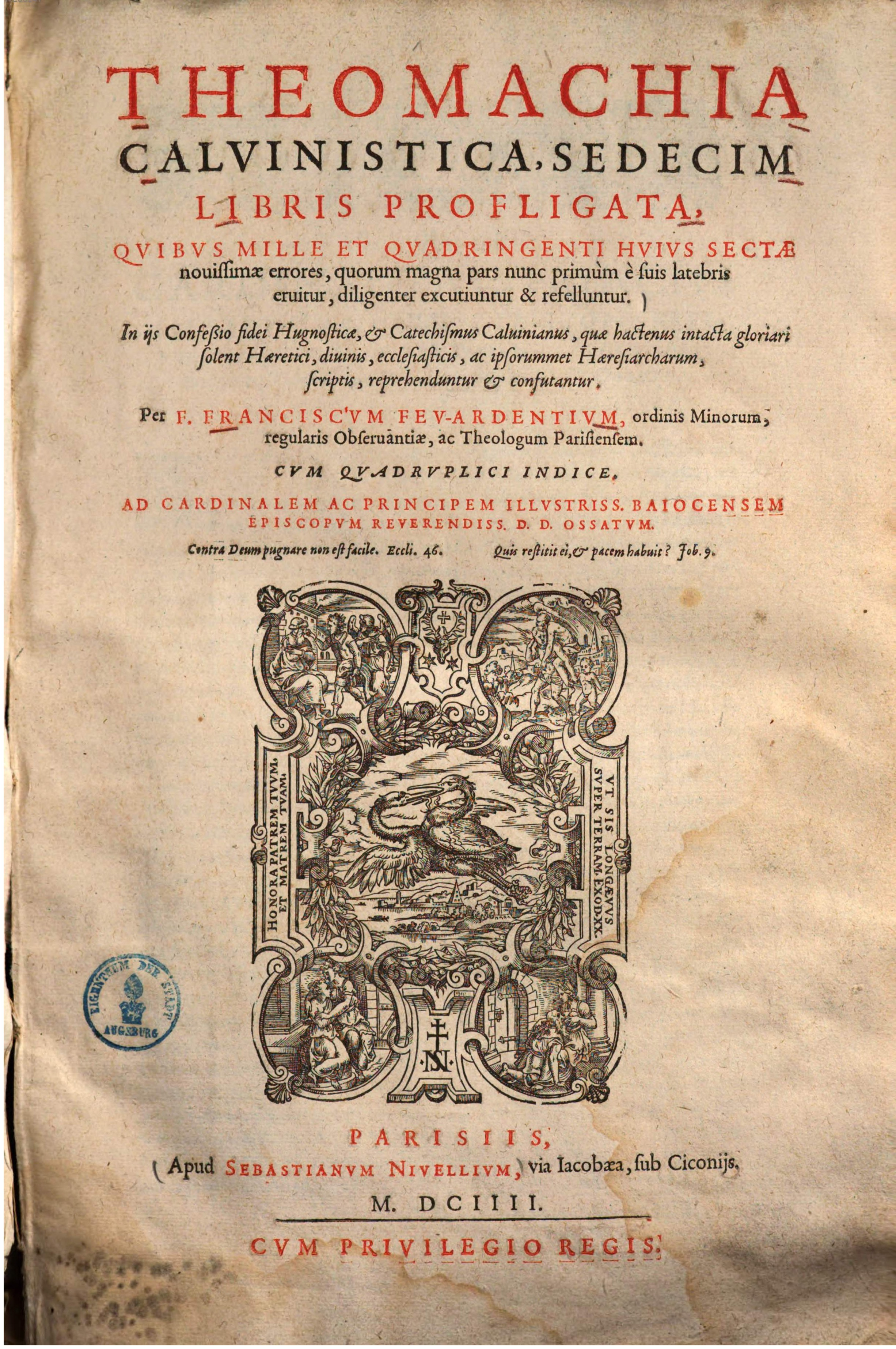 Титульный лист книга Франсуа Фёардена "Theomachia Calvinistica"